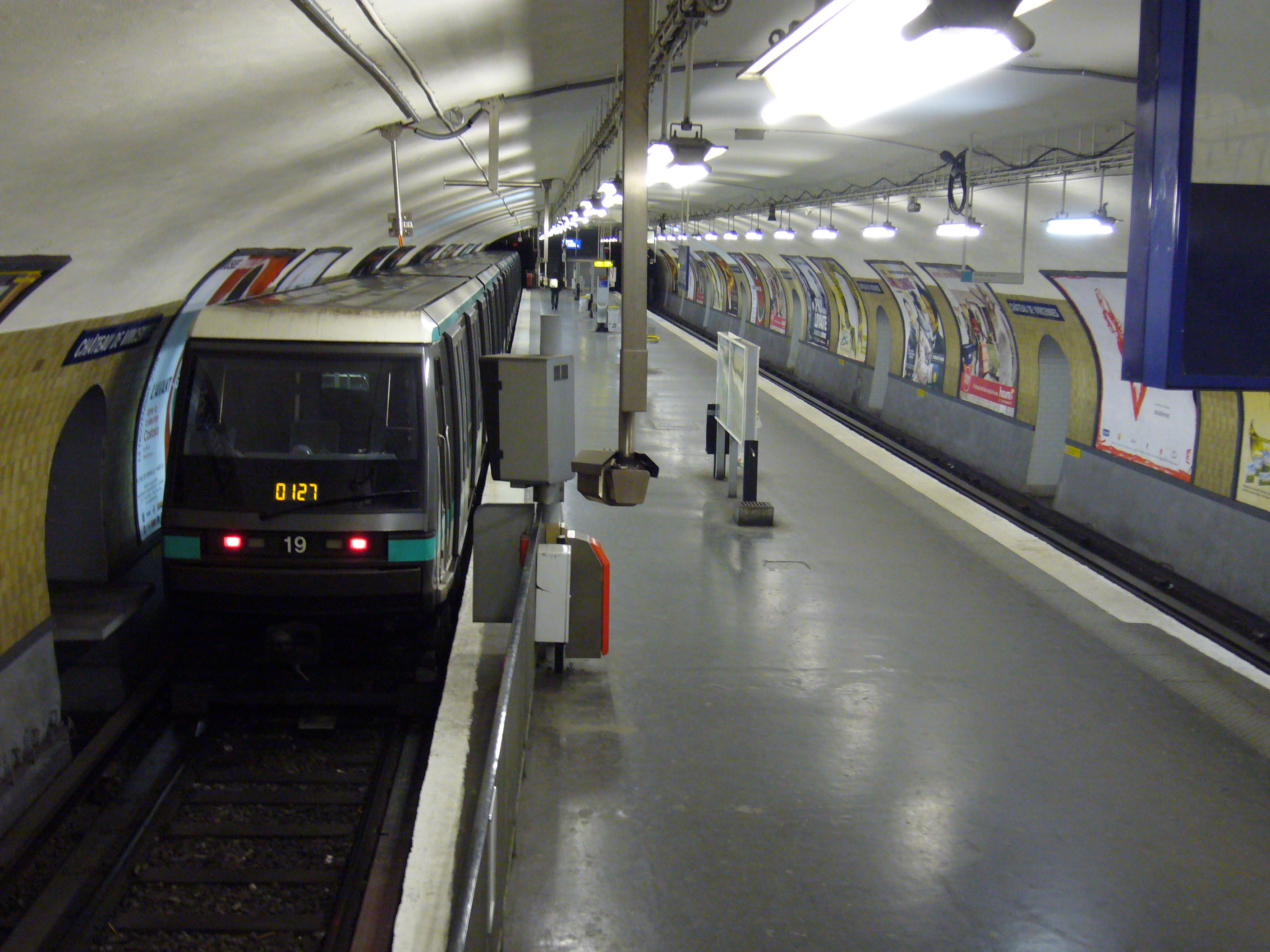 Station Château de Vincennes sur la ligne 1 du métro de Paris.